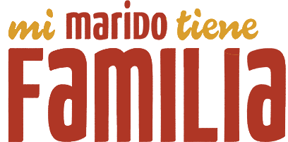 Logo de Mi marido tiene familia